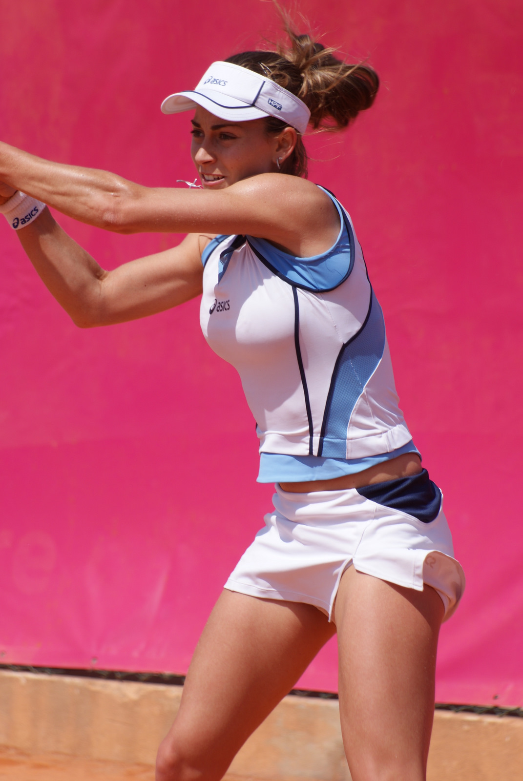 Stefania Chieppa, Open tennis, Cagnes-sur-Mer 2009